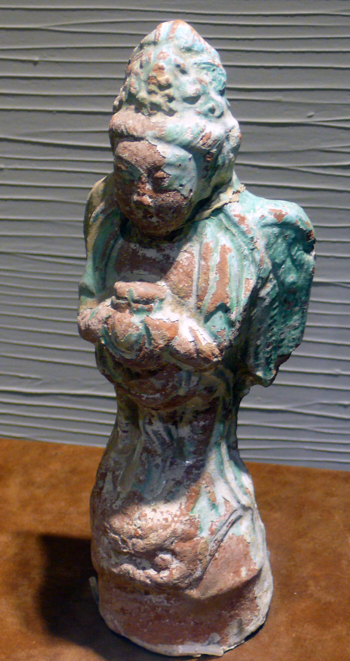 金陵出土绿琉璃釉迦陵频伽，藏于辽金城垣博物馆。